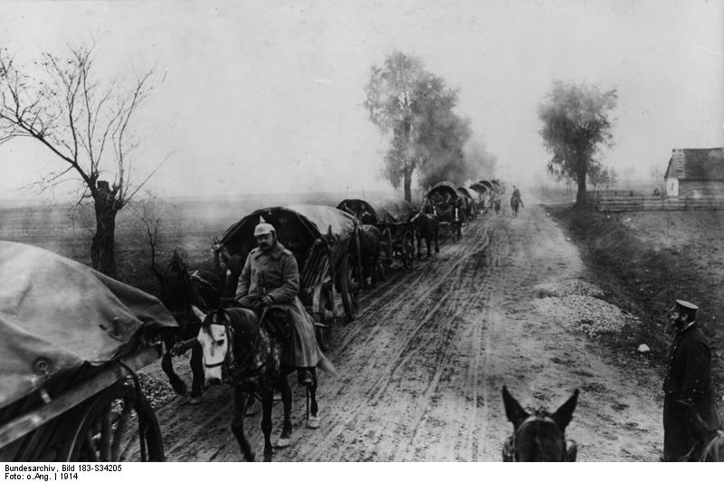 Ostfront, Nachschub-Kolonne Weltkrieg 1914. Deutsche Trainfahrzeuge auf dem Wege ins östliche Feindesland. 24867/14